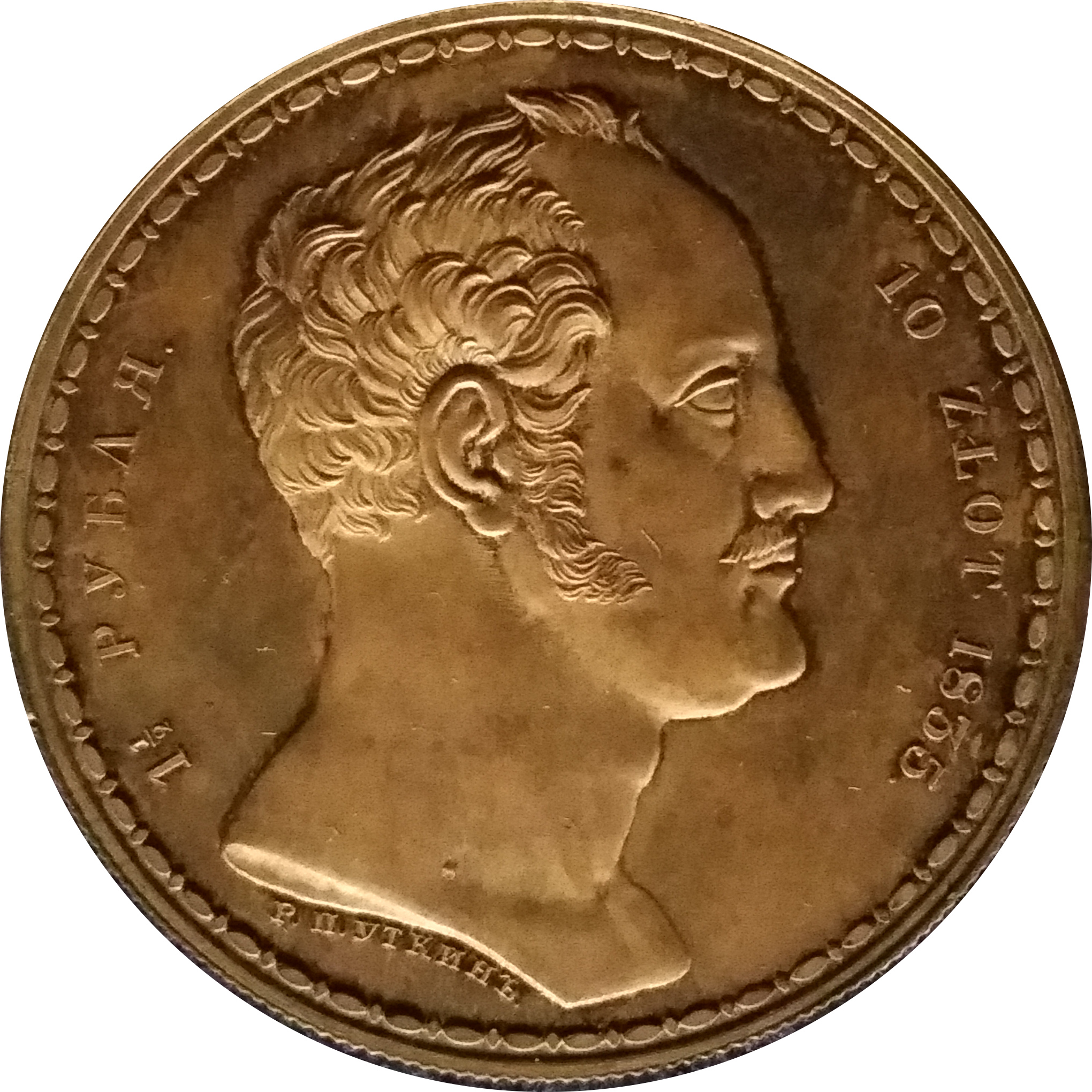 rubel familijny 1835